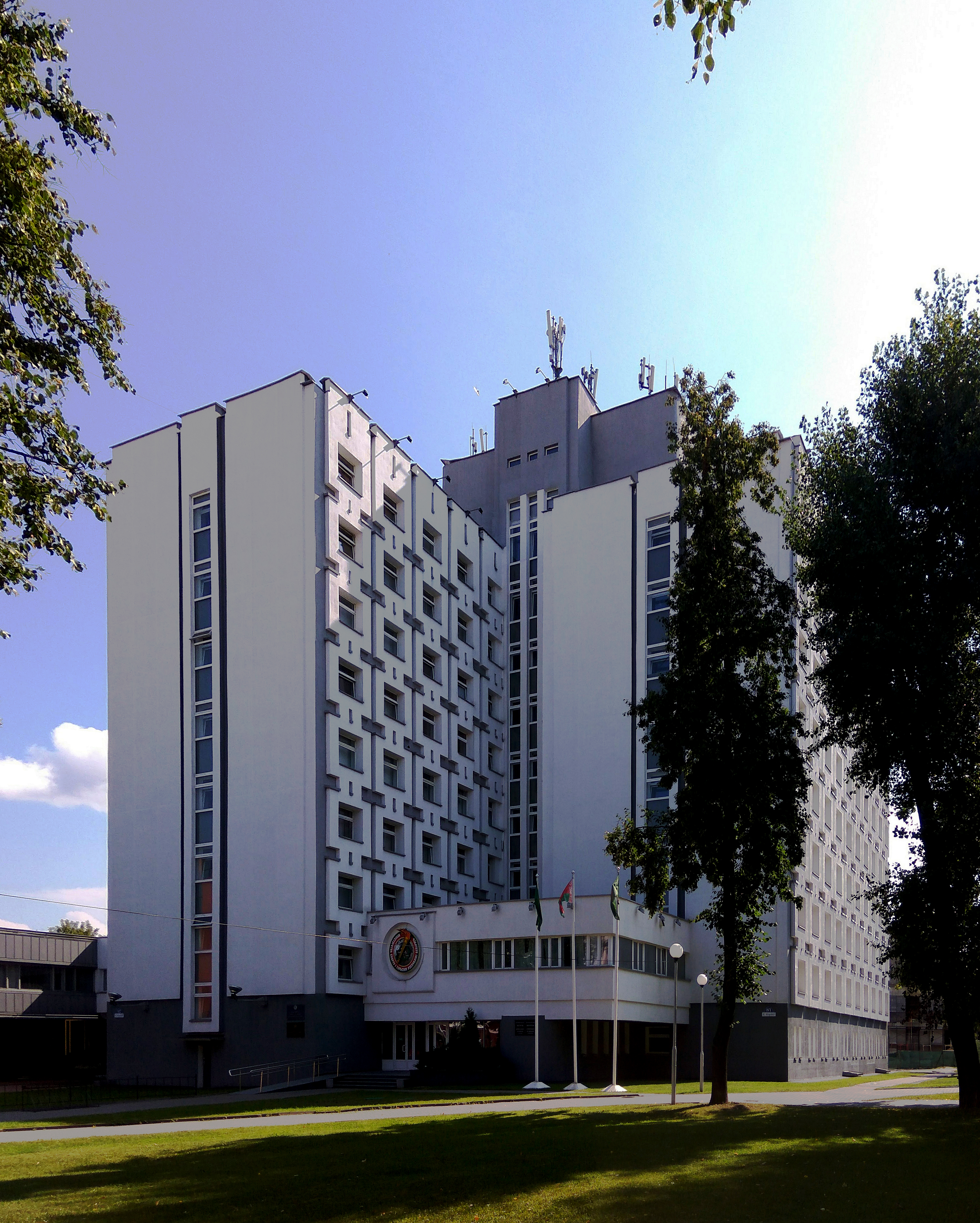 Будыгак Міністэрства спорту і Міністэрства гандлю Беларусі